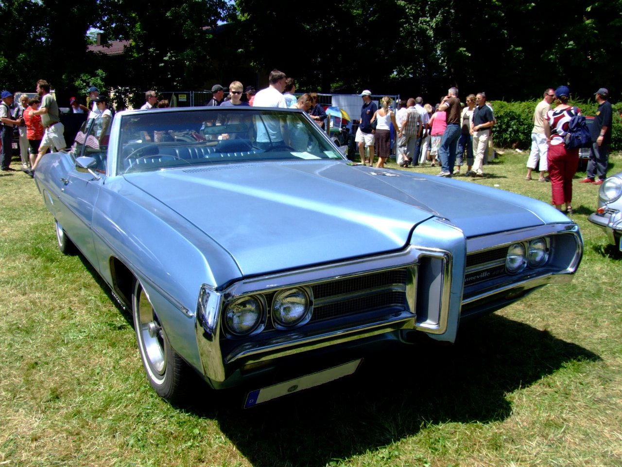 Quelle: selbst fotografiert, 06/2006 Fotograf: Späth Chr. Baujahr: 1969 375 PS